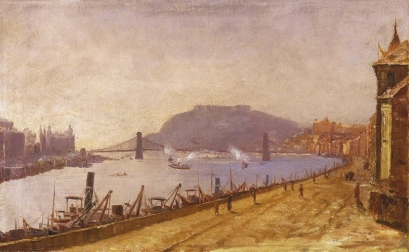 Nándor Katona (1864–1932): Budapest a szazadfordulon